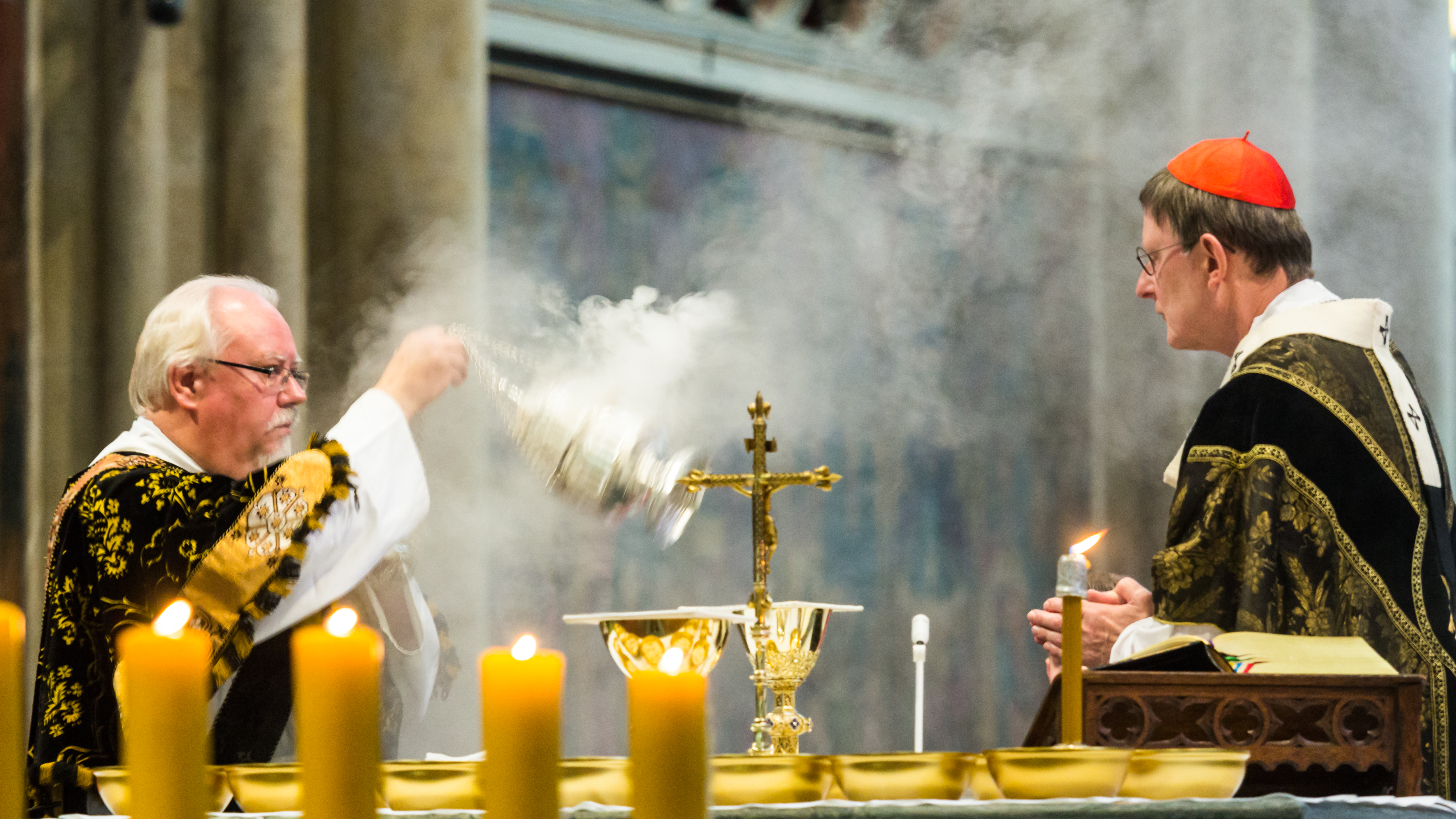 Exsequien Joachim Kardinal em. Meisner